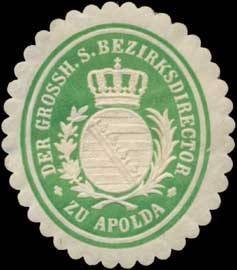 Sealing stamp Title: Der Gr.S. Bezirksdirektor zu Apolda Description: grün, weiß, geprägt Place: Apolda size: 4x4 cm